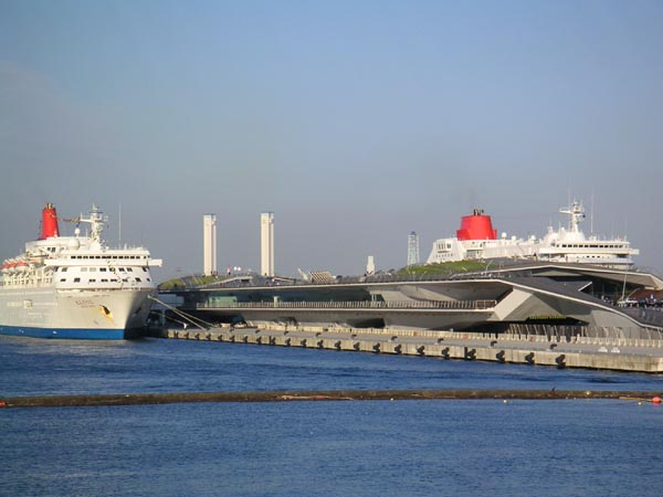 横浜港大さん橋に接岸するふじ丸（右）とにっぽん丸（左）。